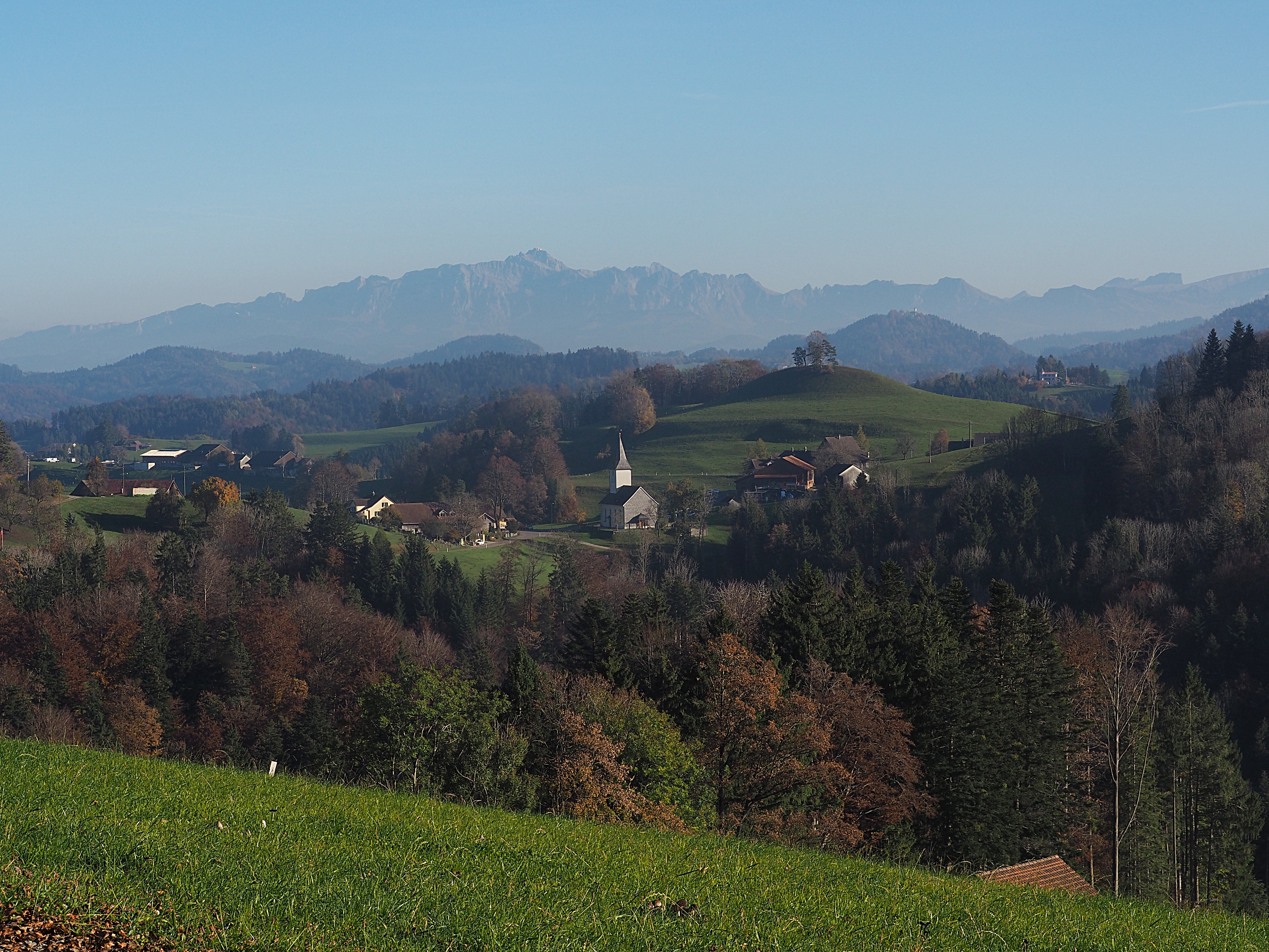 an einem sonnigen Tag im Oktober